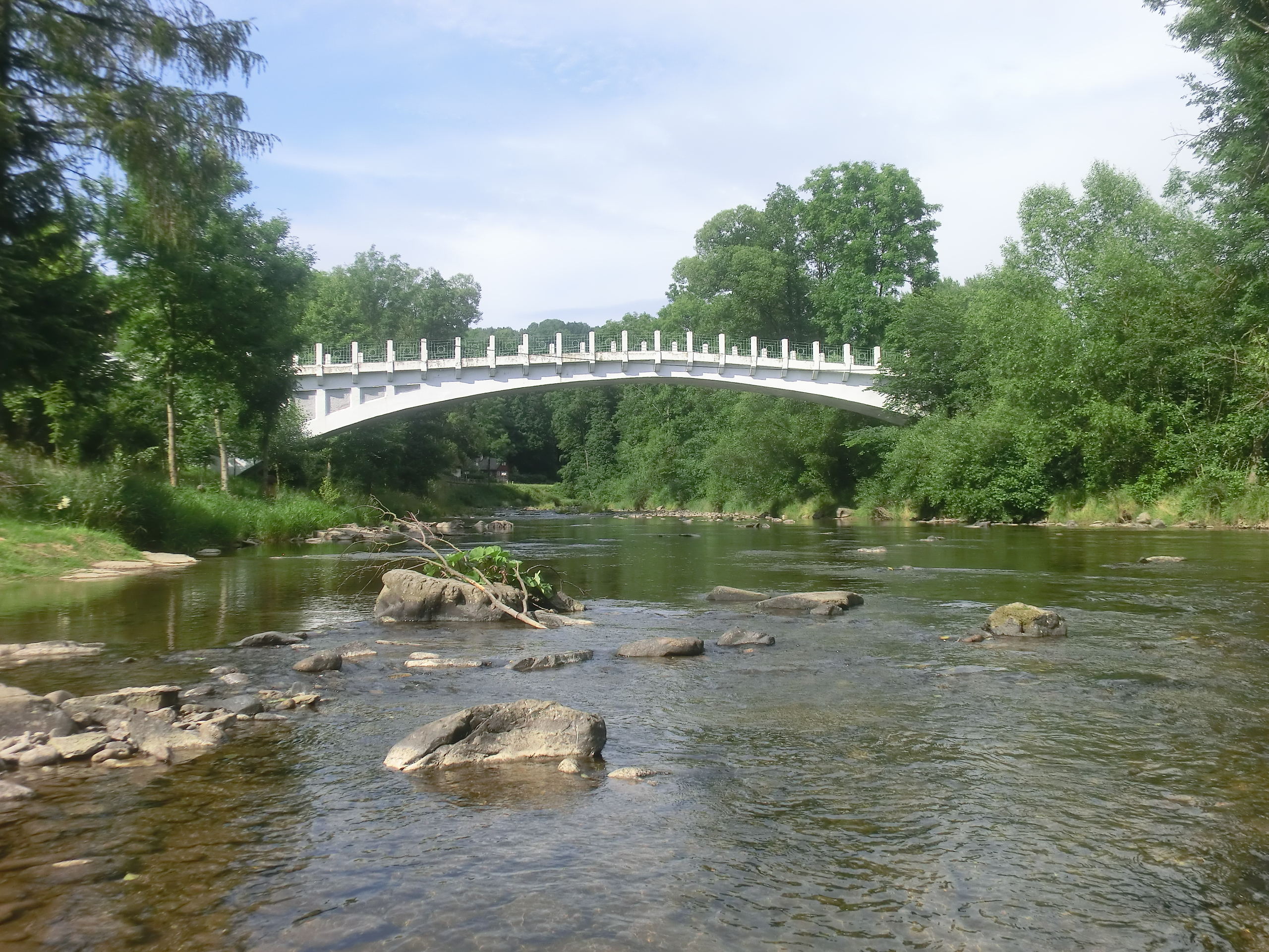 Betonový klenutý most spojuje Peřimov a Mříčnou s hlavní silnicí do Semil od roku 1910.